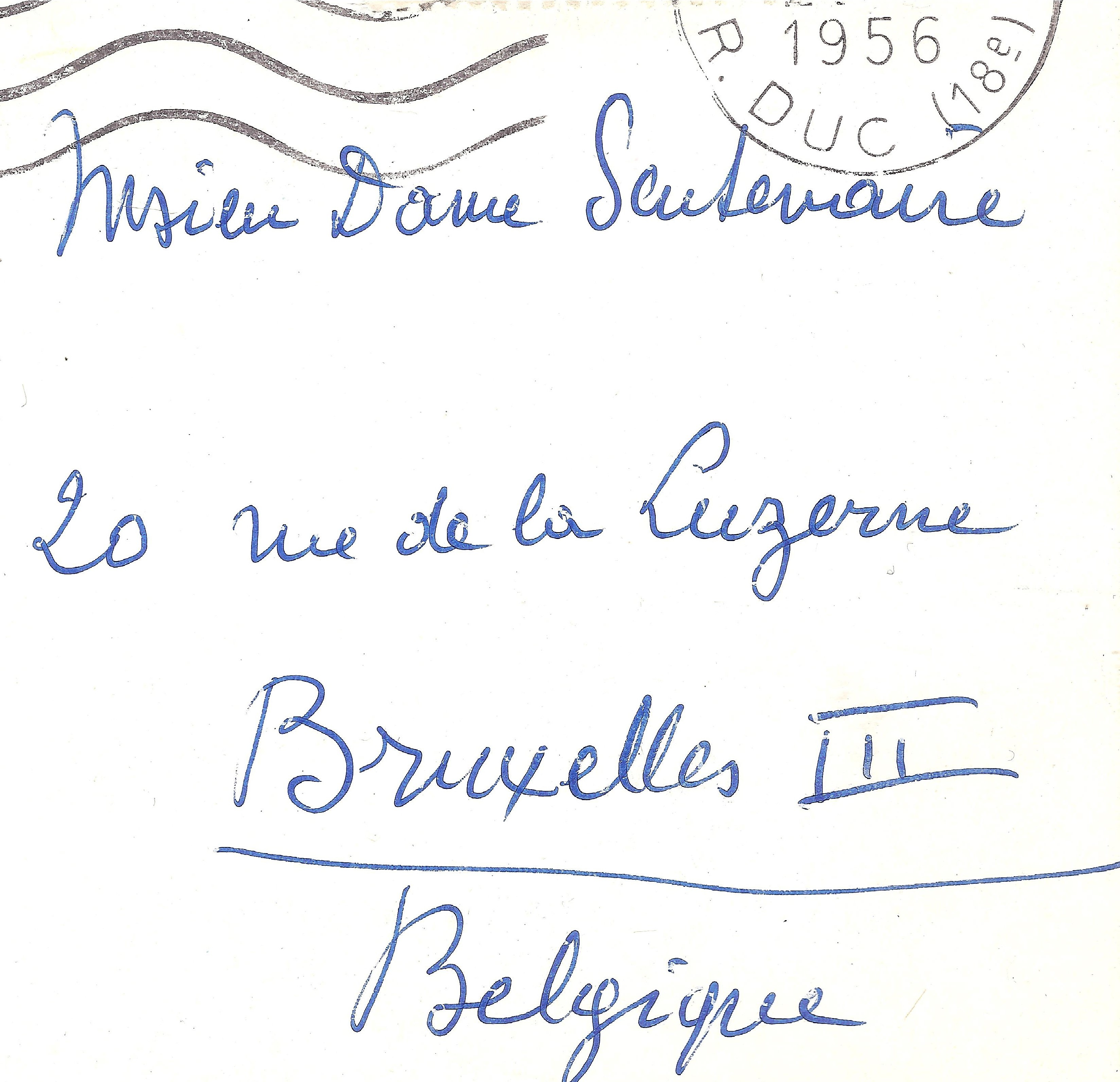 Adresse du poète belge Louis Scutenaire et d'Irène Hamoir sur une carte postale écrite de Concarneau et postée de Paris le 20 janvier 1956 par René Magritte, sa femme Georgette, Raoul Ubac et sa femme Aguy. Scan de janvier 2016.